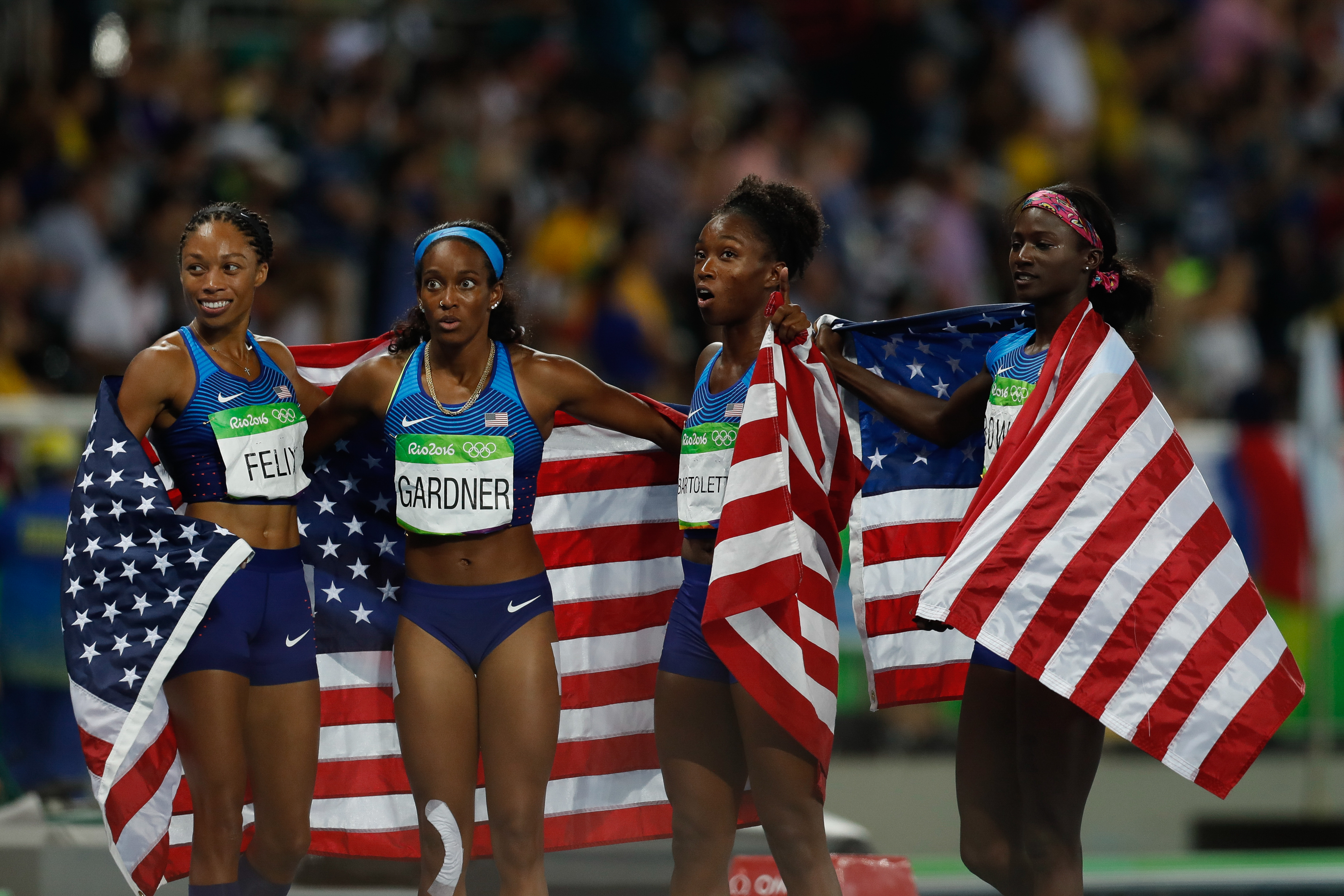 Rio de Janeiro - Corredoras dos Estados Unidos Tianna Bartoletta, Allyson Felix, English Gardner e Tori Bowie vencem final do revezamento 4 x 100m nos Jogos Rio 2016, no Estádio Olímpico (Fernando Frazão/Agência Brasil)